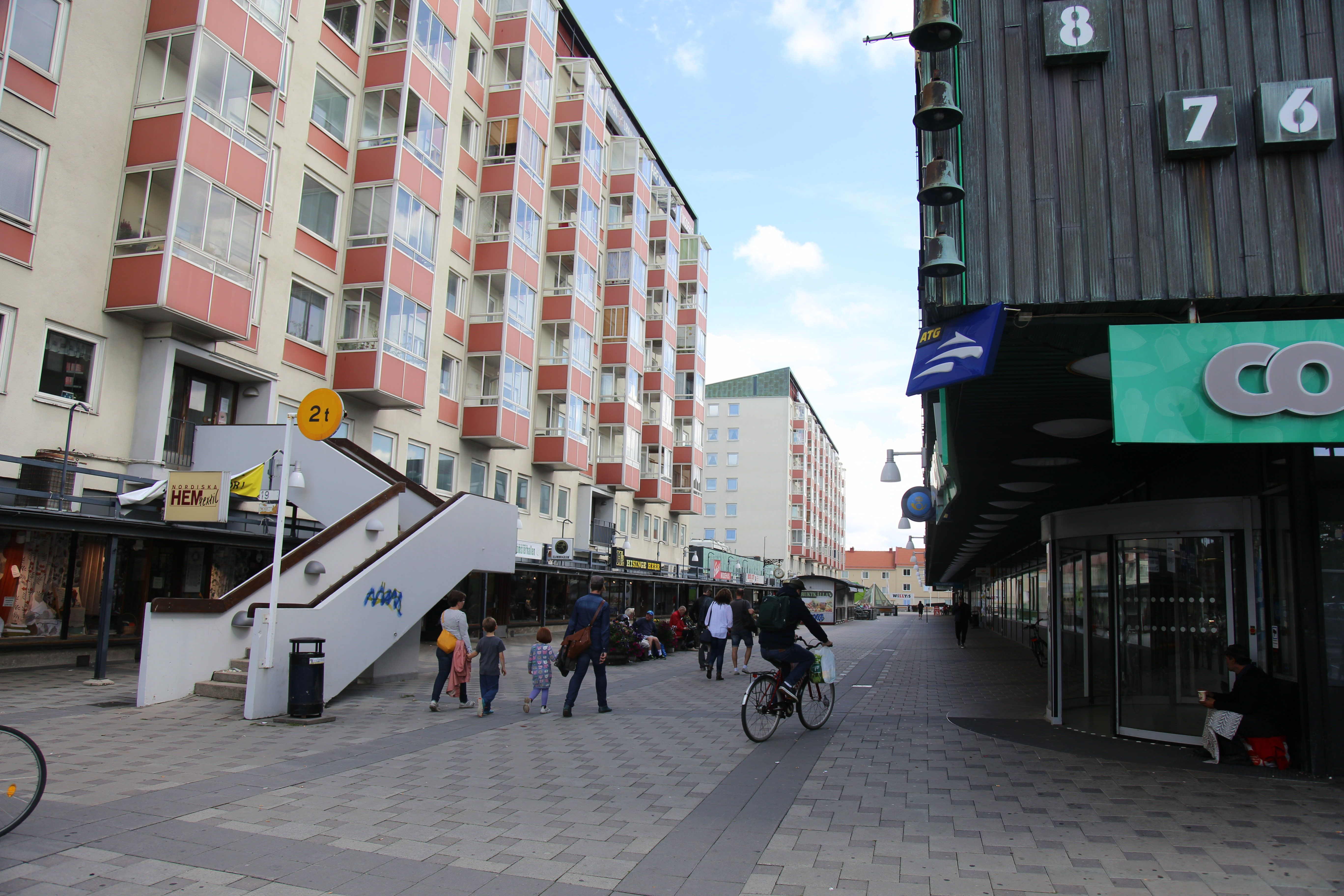 Wieselgrensplatsen i Göteborg. Vy österut.